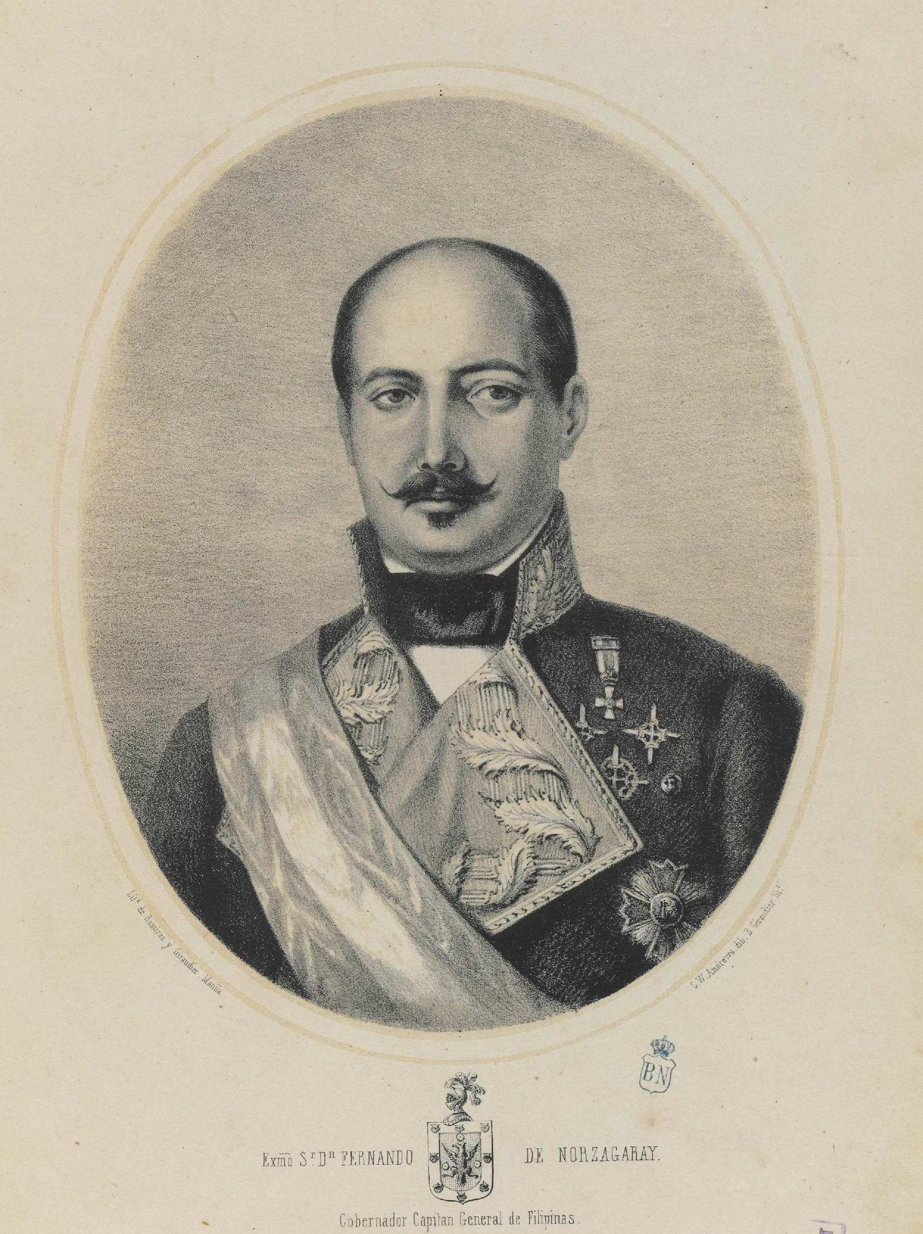 Fernando de Norzagaray y Escudero, 1859, litografía de Baltasar Giraudier por dibujo de C. W. Andreuw, Manila, Litª de Ramírez y Giraudier. Biblioteca Nacional de España